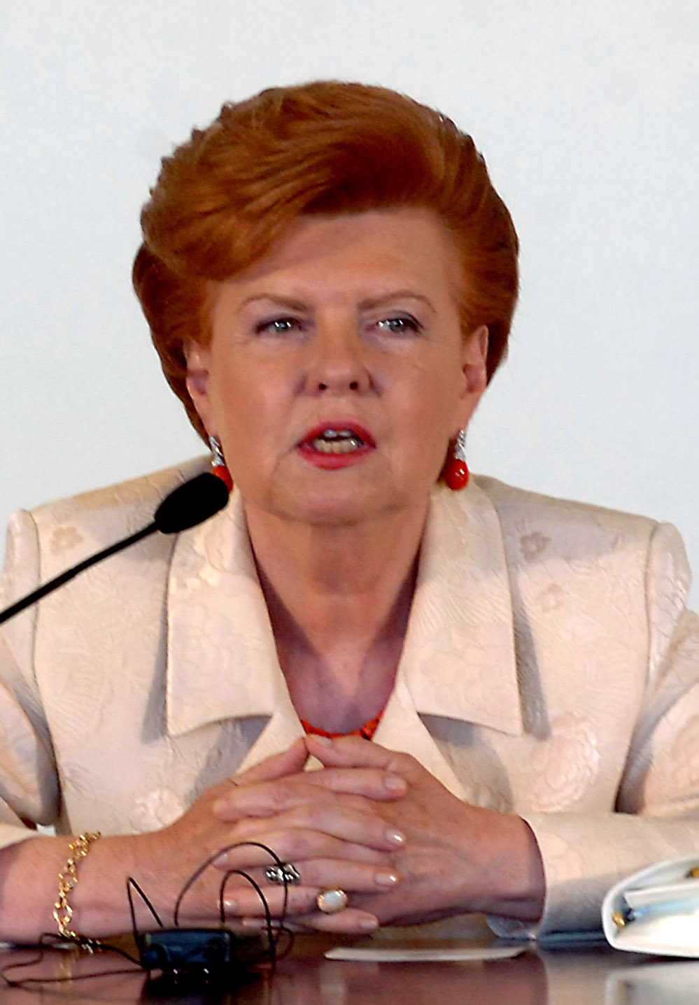 A presidenta da Letônia, Vaira Vīķe-Freiberga